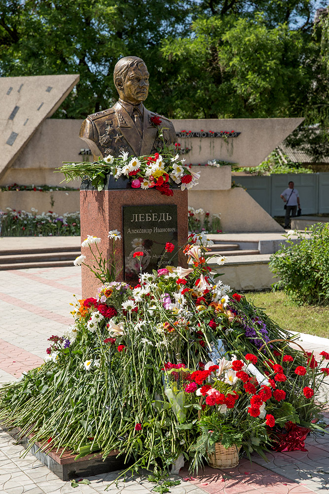 Памятник Александру Лебедю в Бендерах